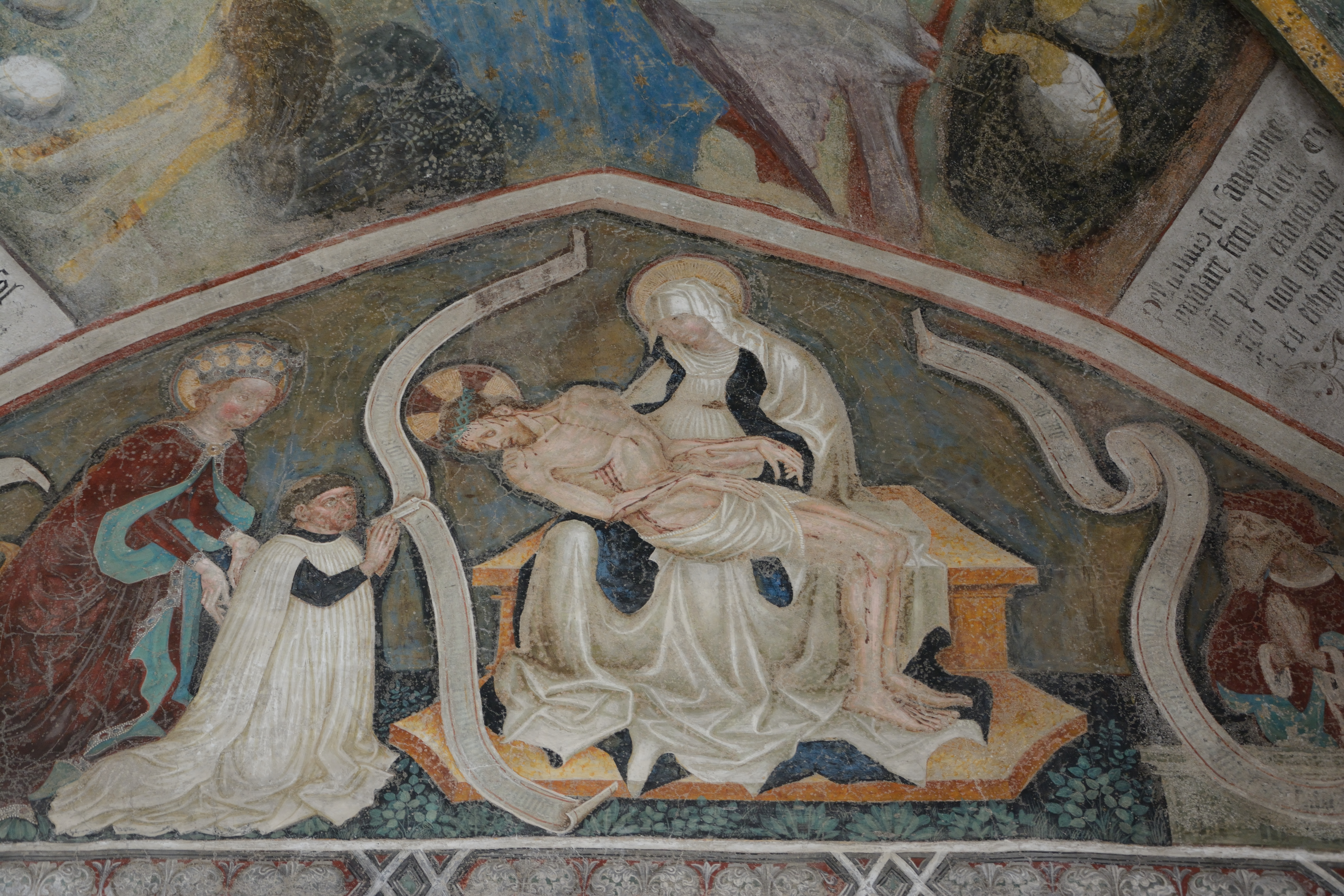 Fresko im Kreuzgang des Brixner Domes, Westwand der 7. Arkade: Pietà mit Stifter Gregor Sybar. Meister Leonhard von Brixen, Mitte des 15. Jahrhunderts.